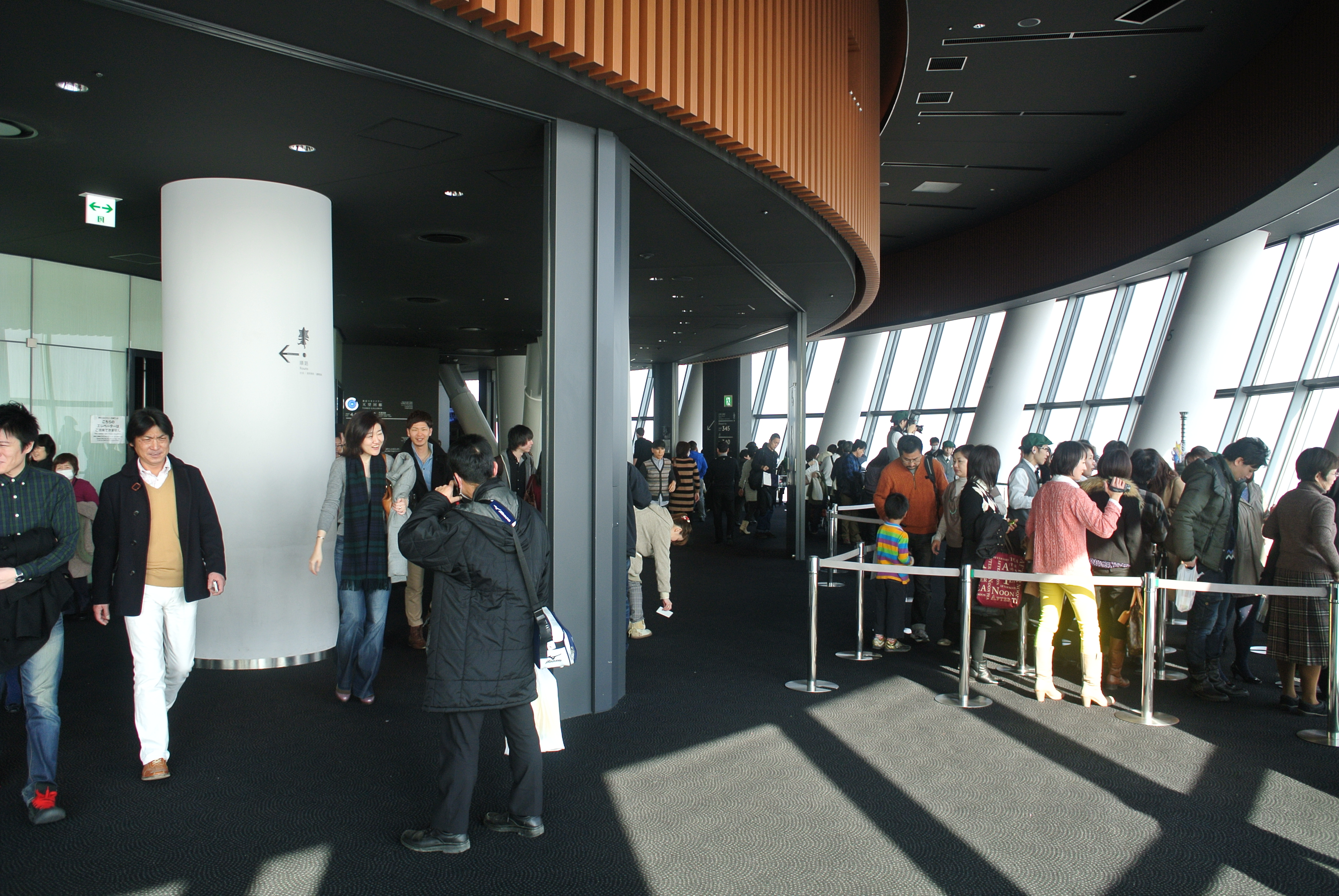 スカイツリー第一展望台